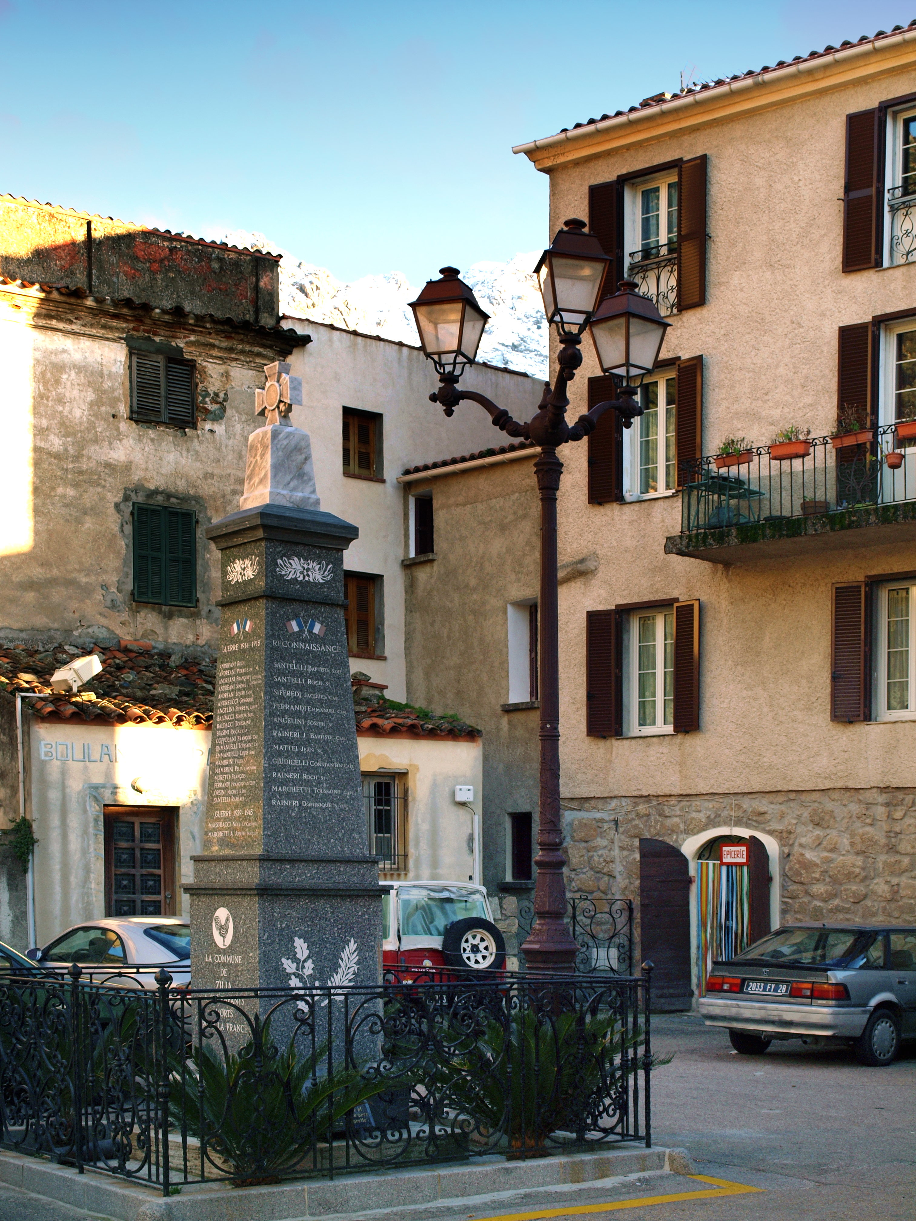 Zilia, Balagne (Corse) - Monument aux morts